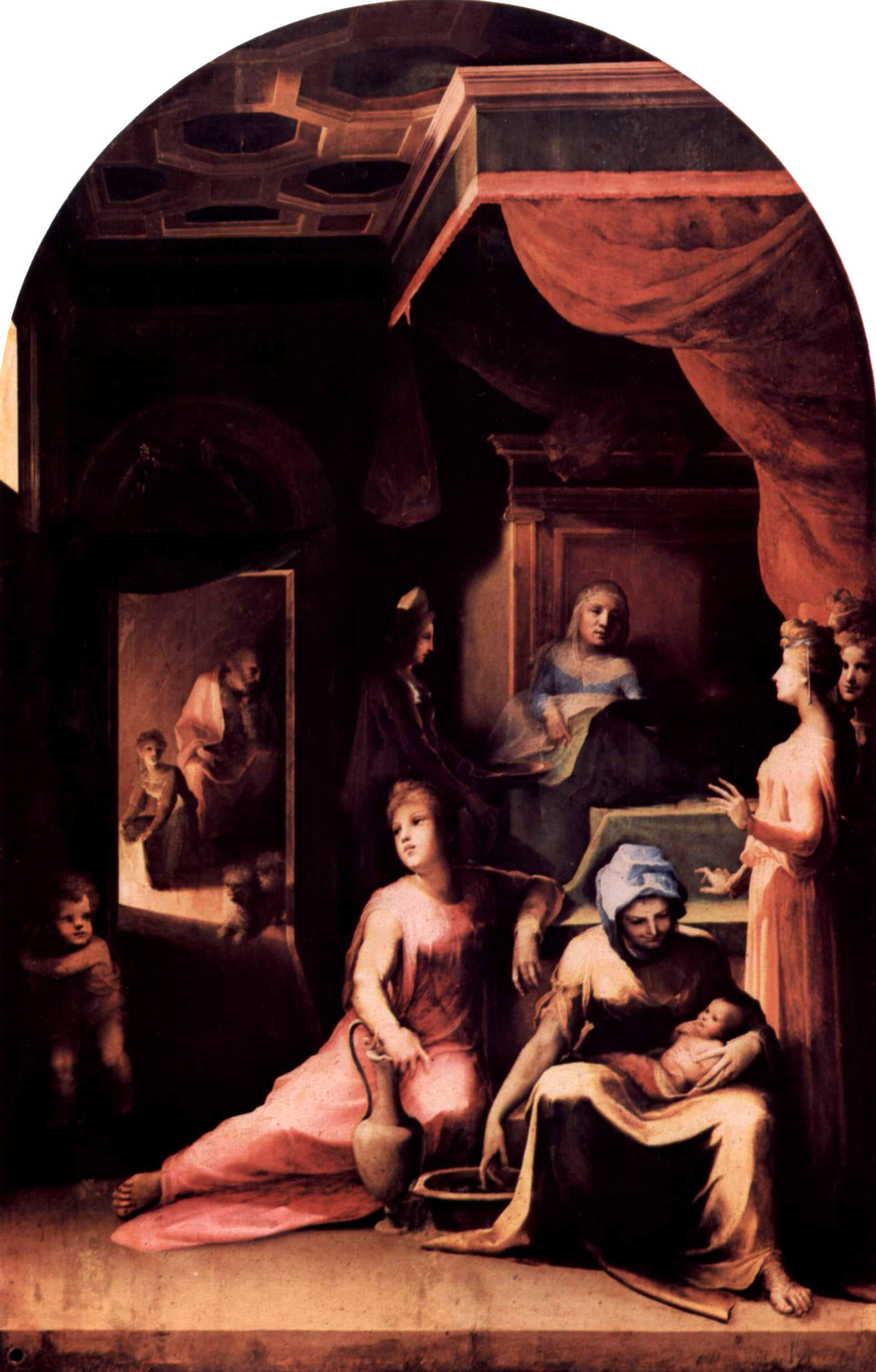 Detail